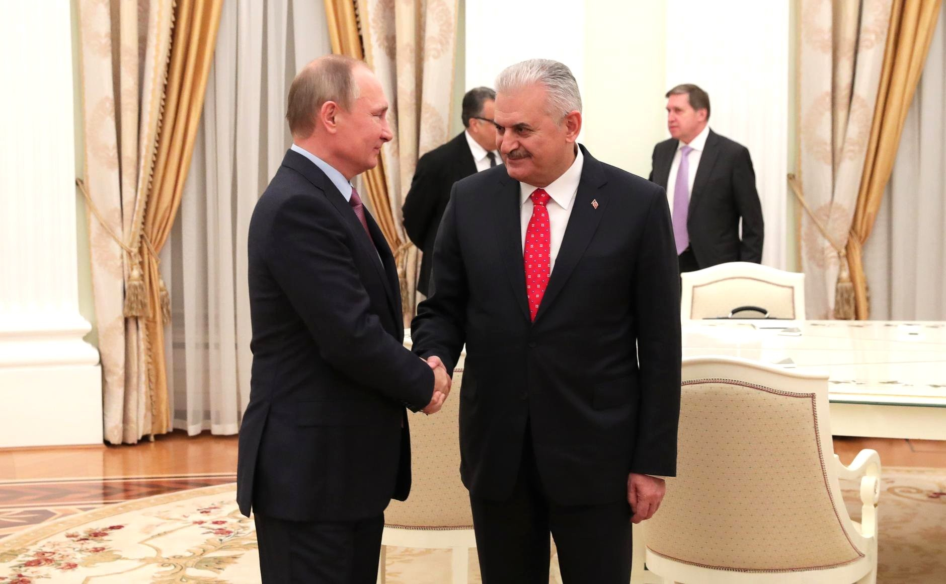 Türkiye Cumhuriyeti Başbakanı Binali Yıldırım, Rusya Devlet Başkanı Vladimir Putin ile görüşüyor